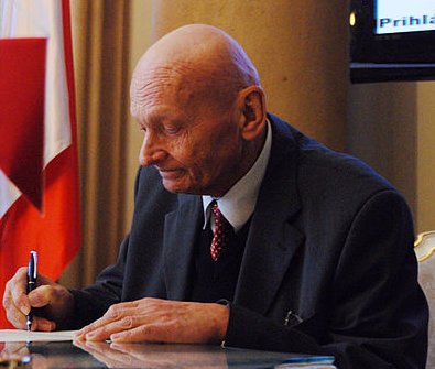 Peter Dubček - poslanec mestského zastupiteľstva a BSK